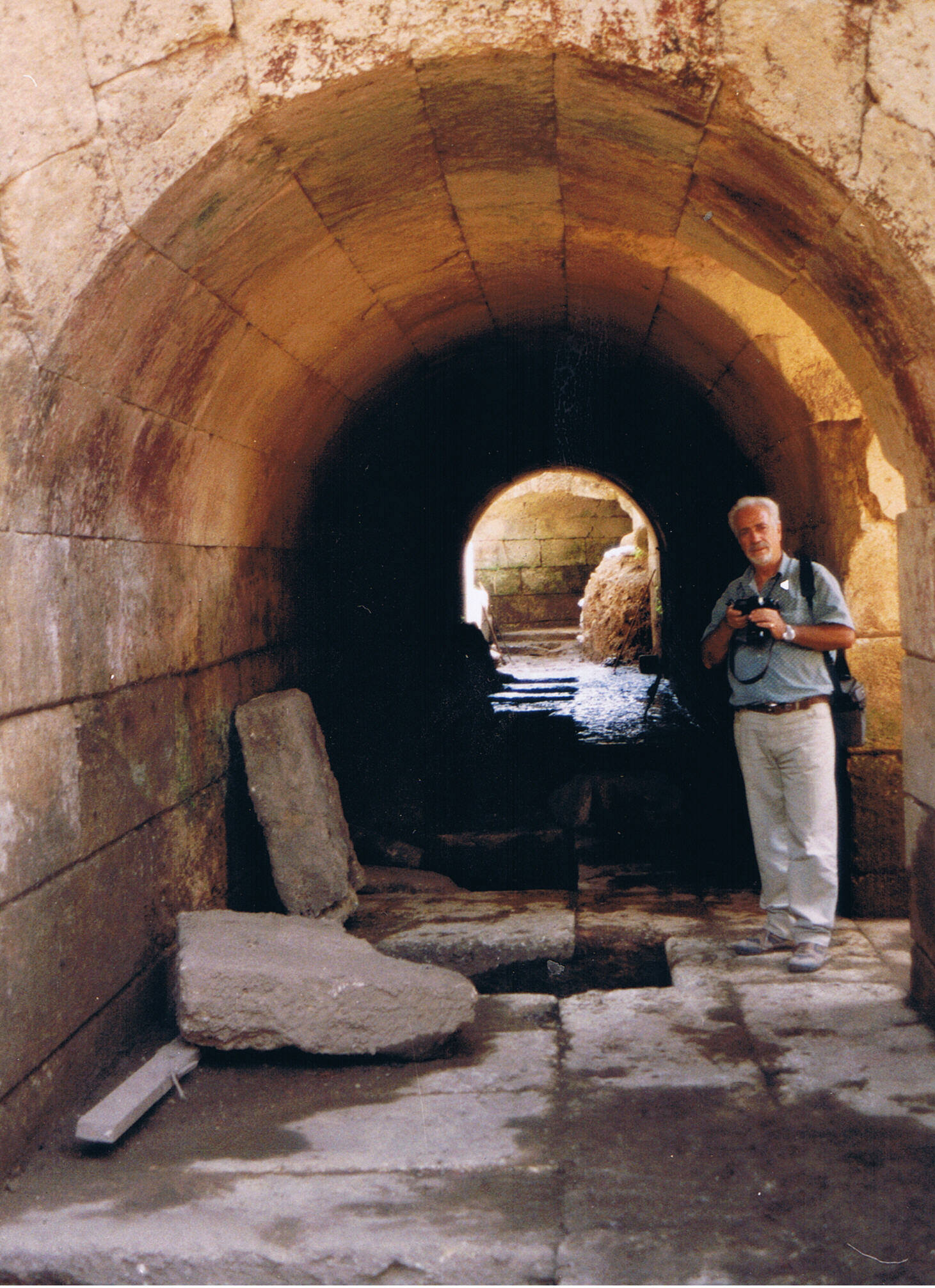 Vassilios Tzaferis – Israeli Archaeologist וסיליוס צפיריס, ארכאולוג ישראלי ממוצא יווני. נולד באי סאמוס ביוון. חבר בקהילה היוונית בישראל. חפר בבניאס, כורסי כפר נחום ועוד. צפיריס בחפירות הארכאולוגיות בבאניס בשנת 1998